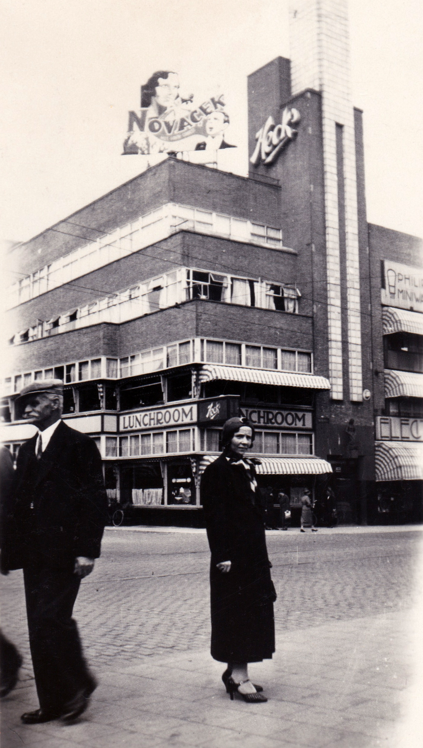 Evelyn Novacek, staande voor Heck in Utrecht, met op het dak reclame voor haar optreden, gefotografeerd door haar zoon Joop Wolbrink